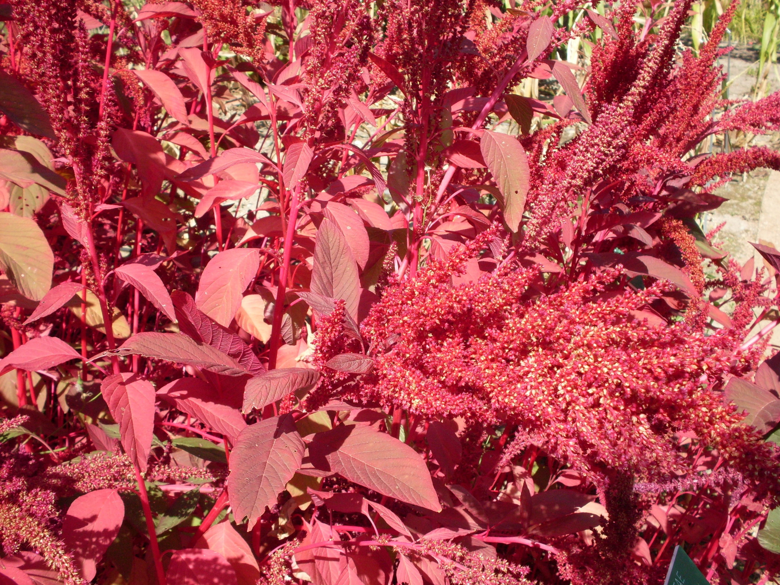 Amaranthus cruentus L. (amarante rouge ou paniculée) dans le jardin botanique Henri-Gaussen, Toulouse, France